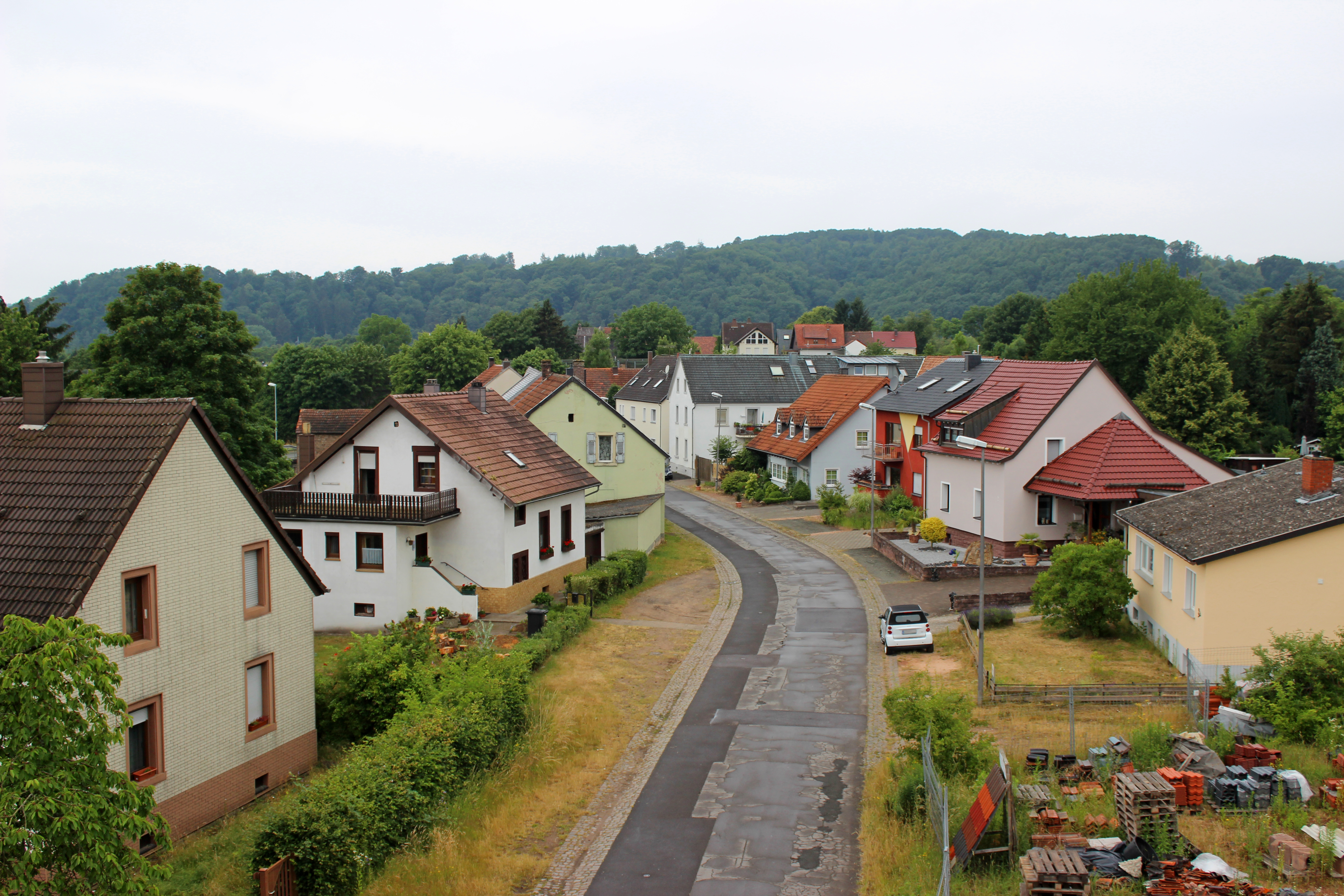 Ansicht von Ingweiler, einem Ortsteil von Einöd, Stadt Homburg, Saarpfalz-Kreis, Saarland